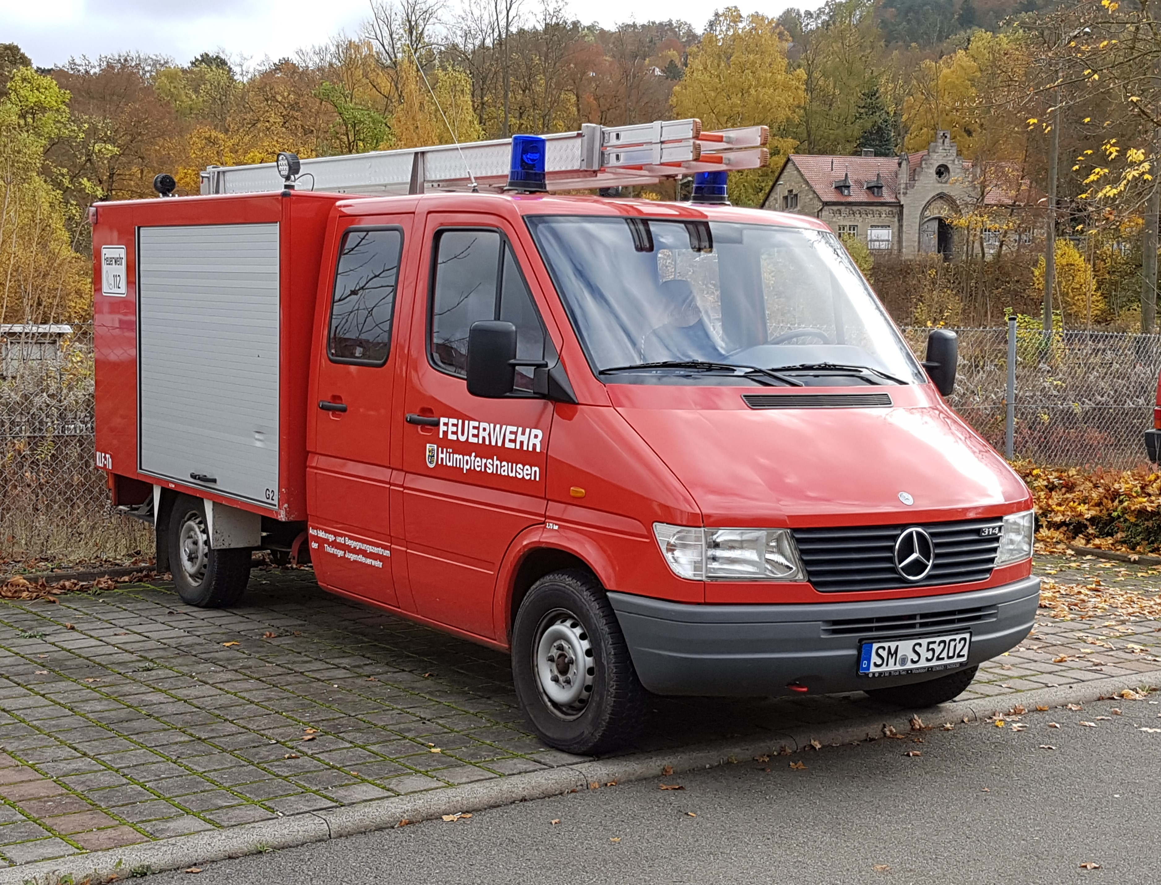 Kleinlöschfahrzeug Thüringen (KLF-TH) der Thüringer Feuerwehr Hümpfershausen im Landkreis Schmalkalden-Meiningen.